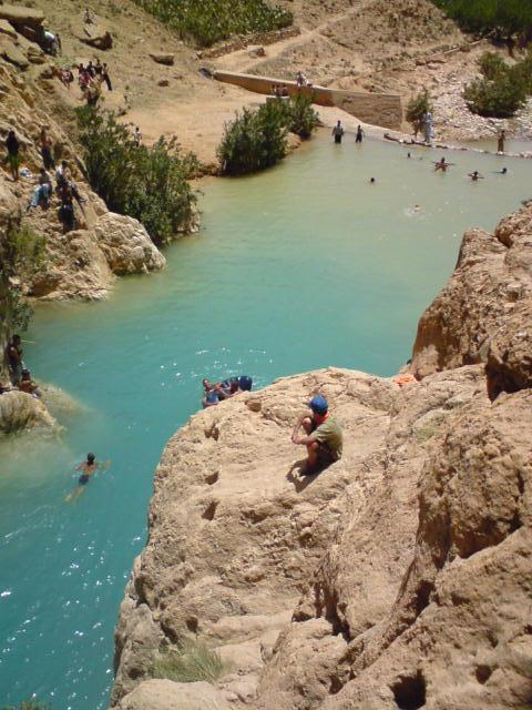 Village de Menâa